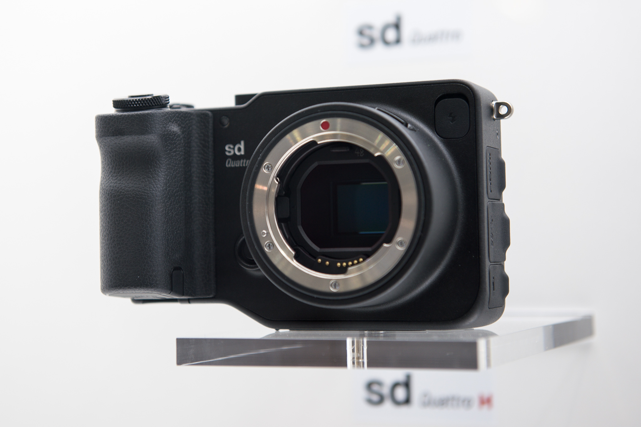 Kölnmesse,Photokina 2016,Sigma,sd Quattro